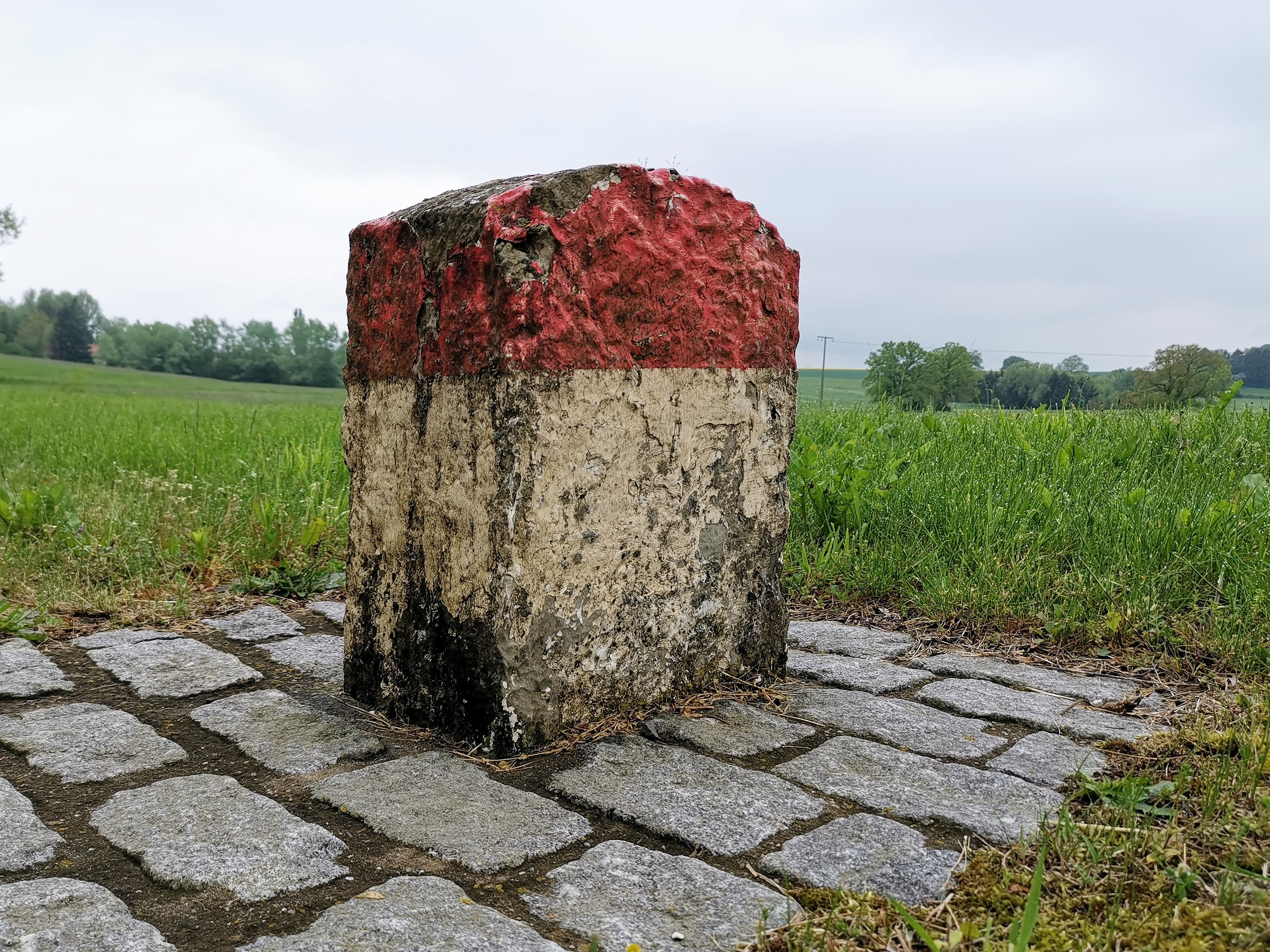 Borne kilométrique sur la Nationale 13 (route des Trois-Cantons) à proximité de Dippach-Gare (Grand-Duché de Luxembourg)